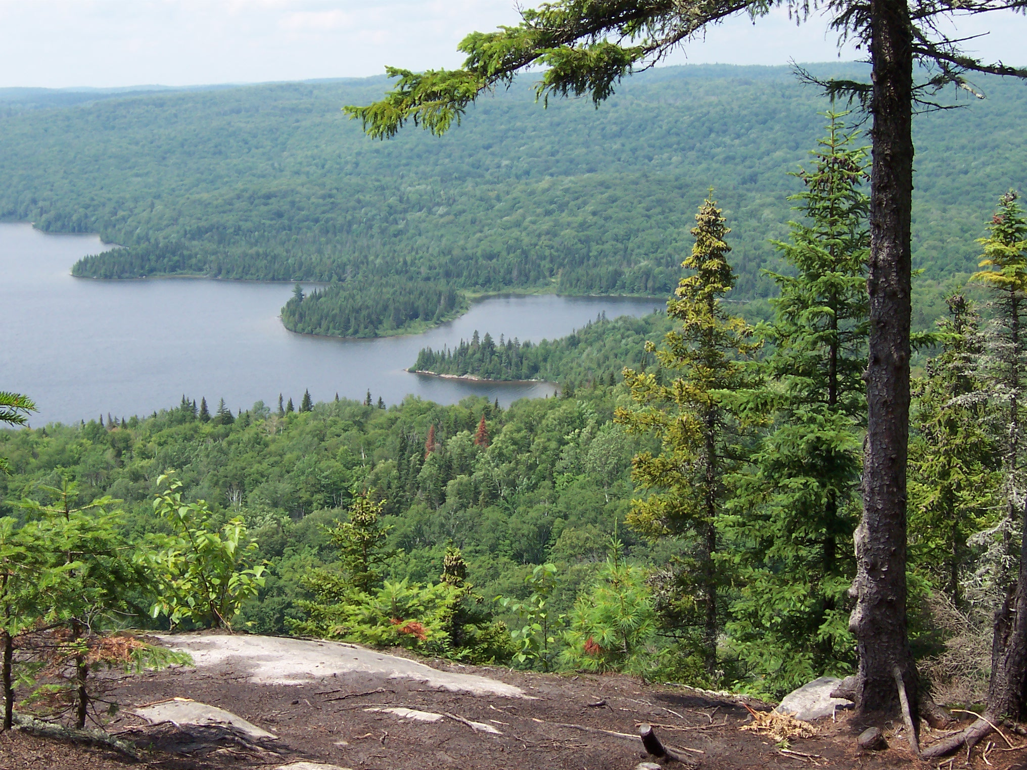 Lac Saint-Bernard, dans la Réserve faunique Mastigouche.